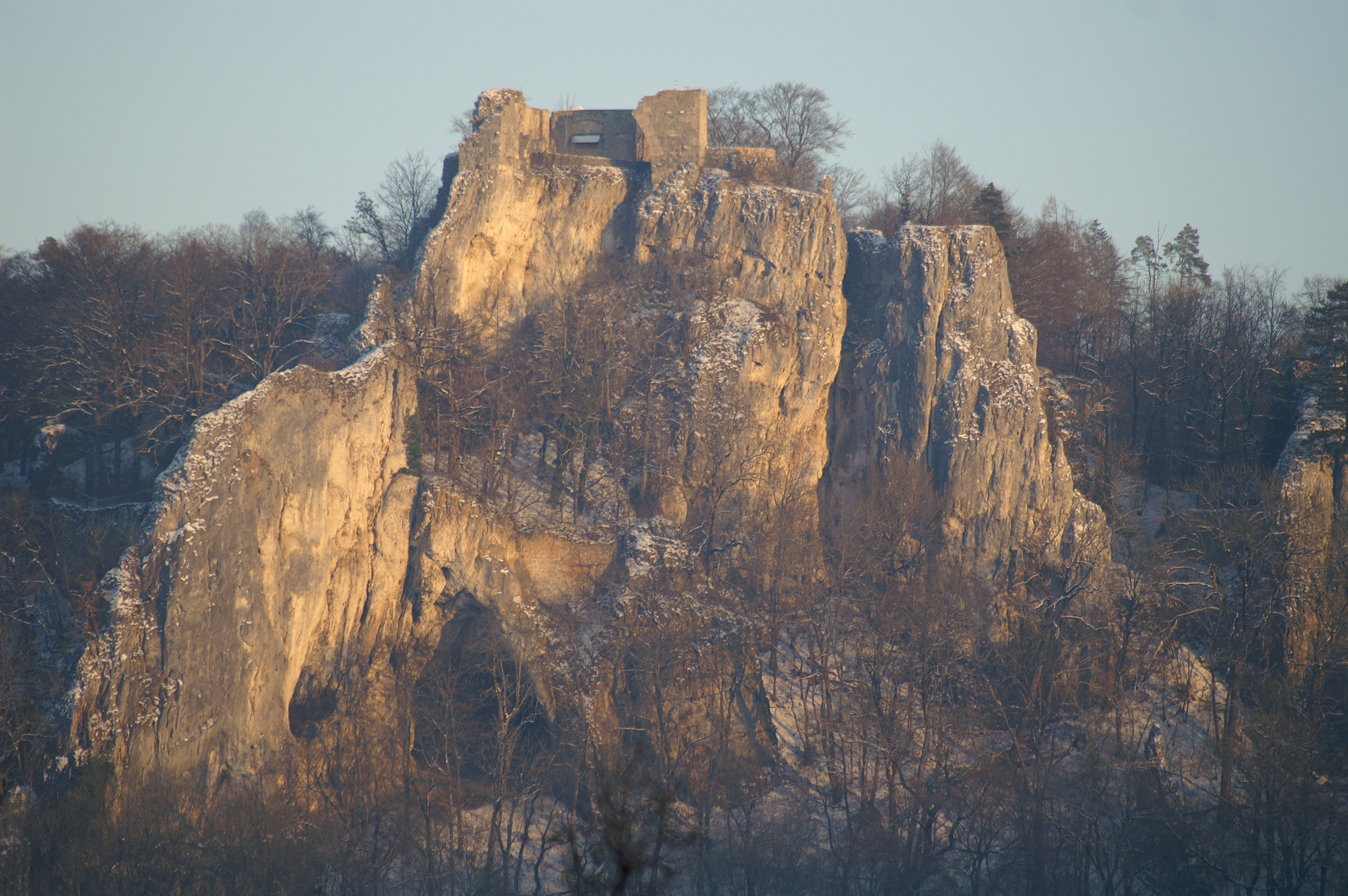 Unterhalb vom Rusenschloß in Blaubeuren befinden sich archäologisch interessante Höhlen, wie beispielsweise die Große Grotte